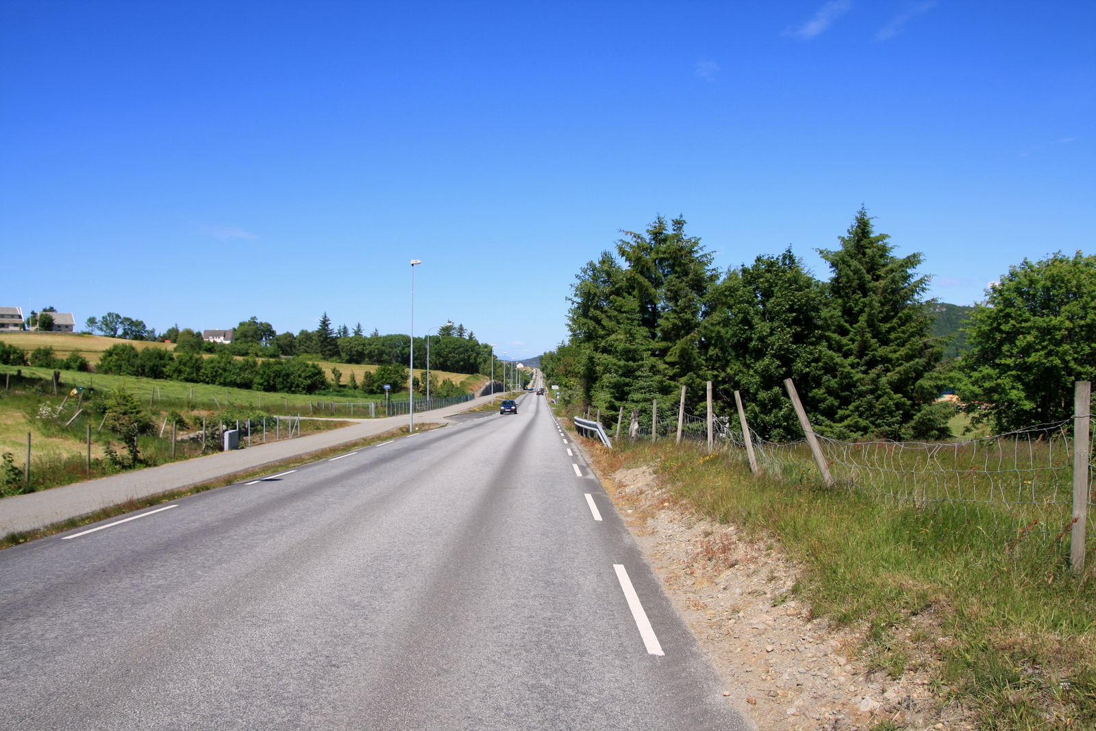 Fylkesvei 516 Hommersåkveien